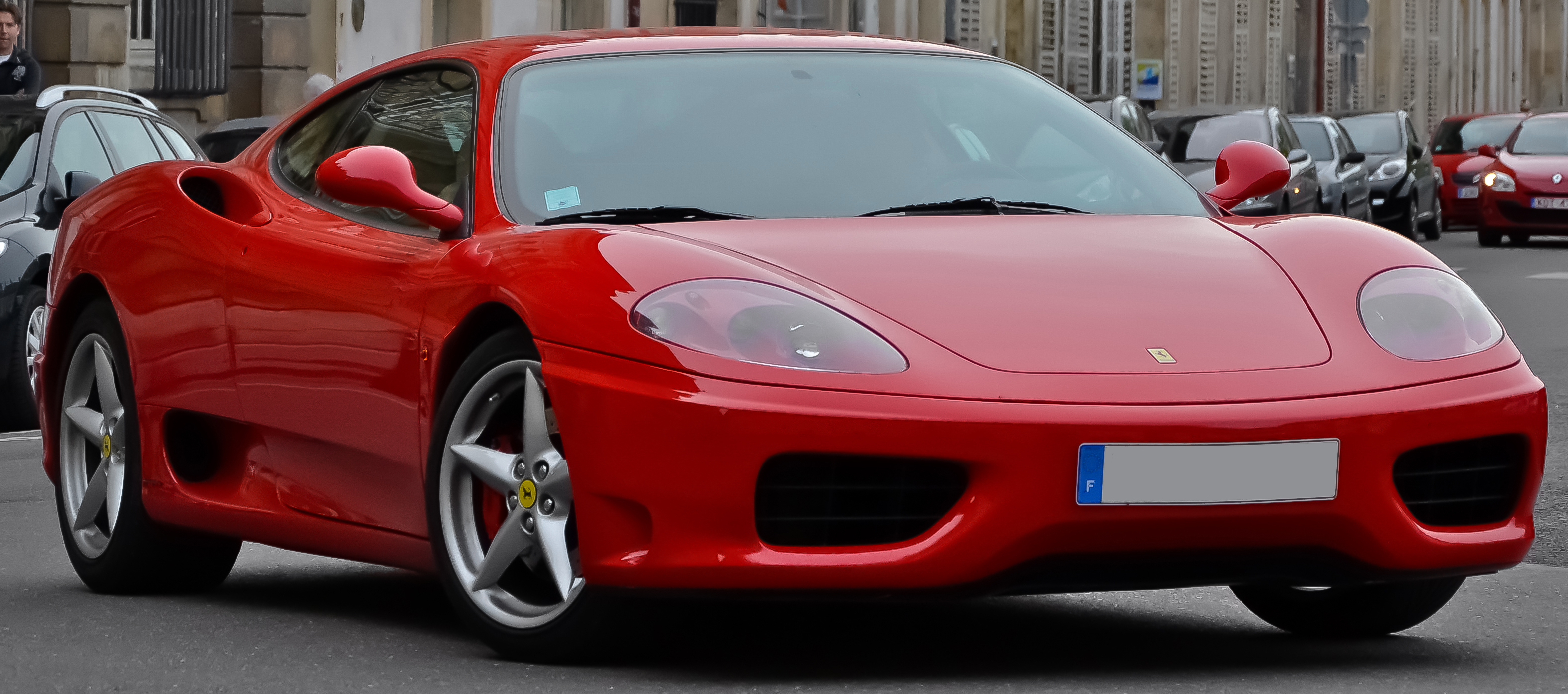 Ferrari 360 Modena